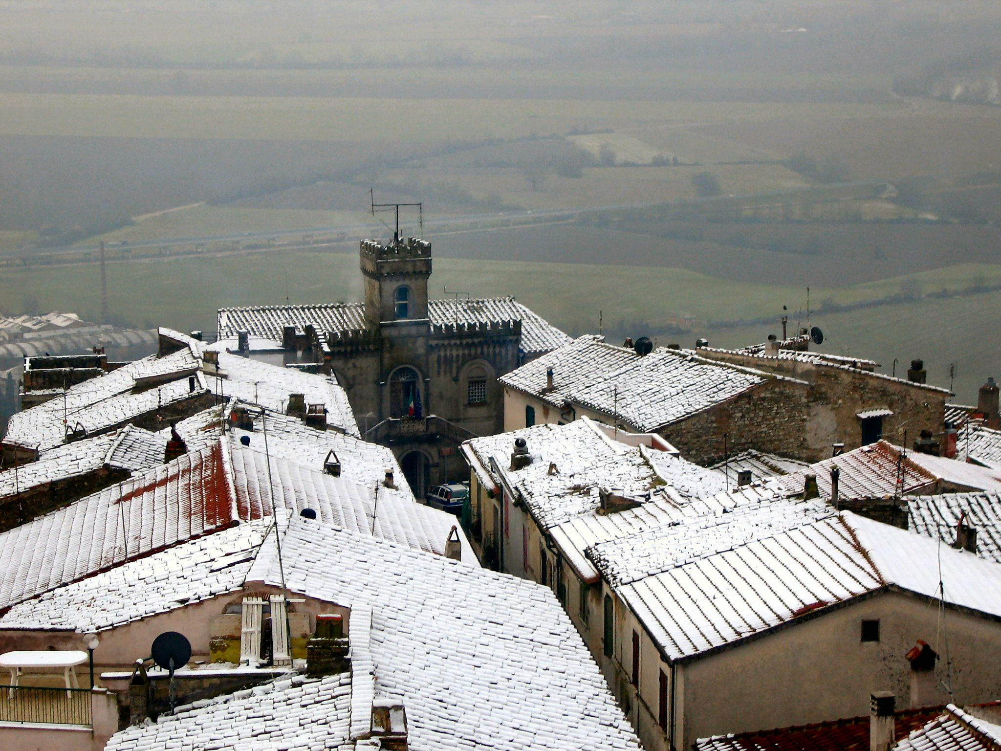 Stimigliano sotto la neve